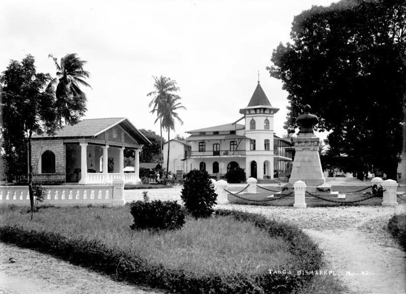 Tanga, Bismarckdenkmal, Kasino und Musikhalle